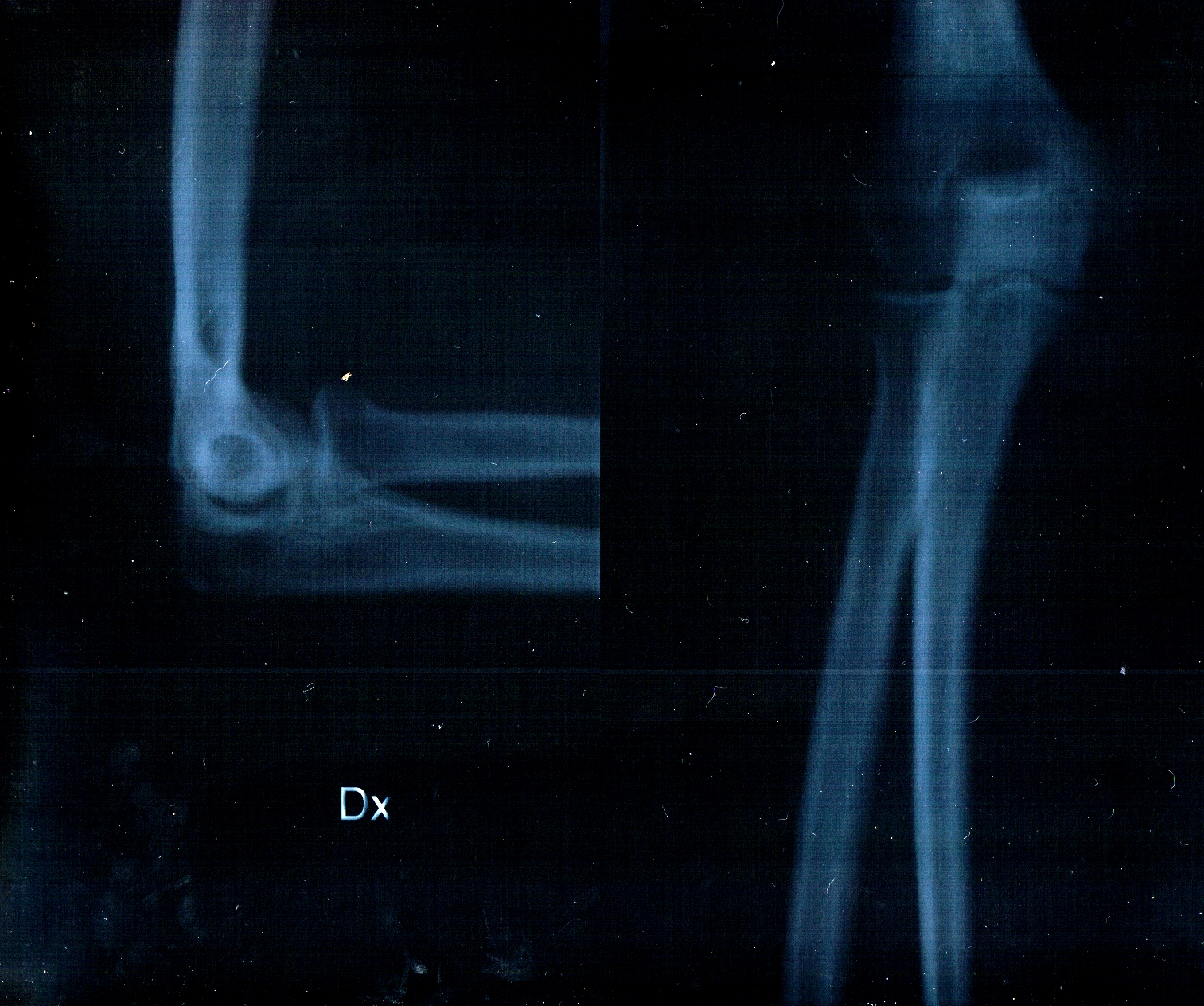 braccio umano fotografato ai raggi x